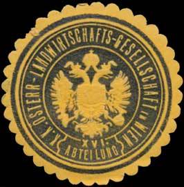 Sealing stamp Title: K.K. österr. Landwirtschafts-Gesellschaft in Wien Description: XVI. Abteilung, gelb, schwarz, geprägt Place: Wien size: 4 cm